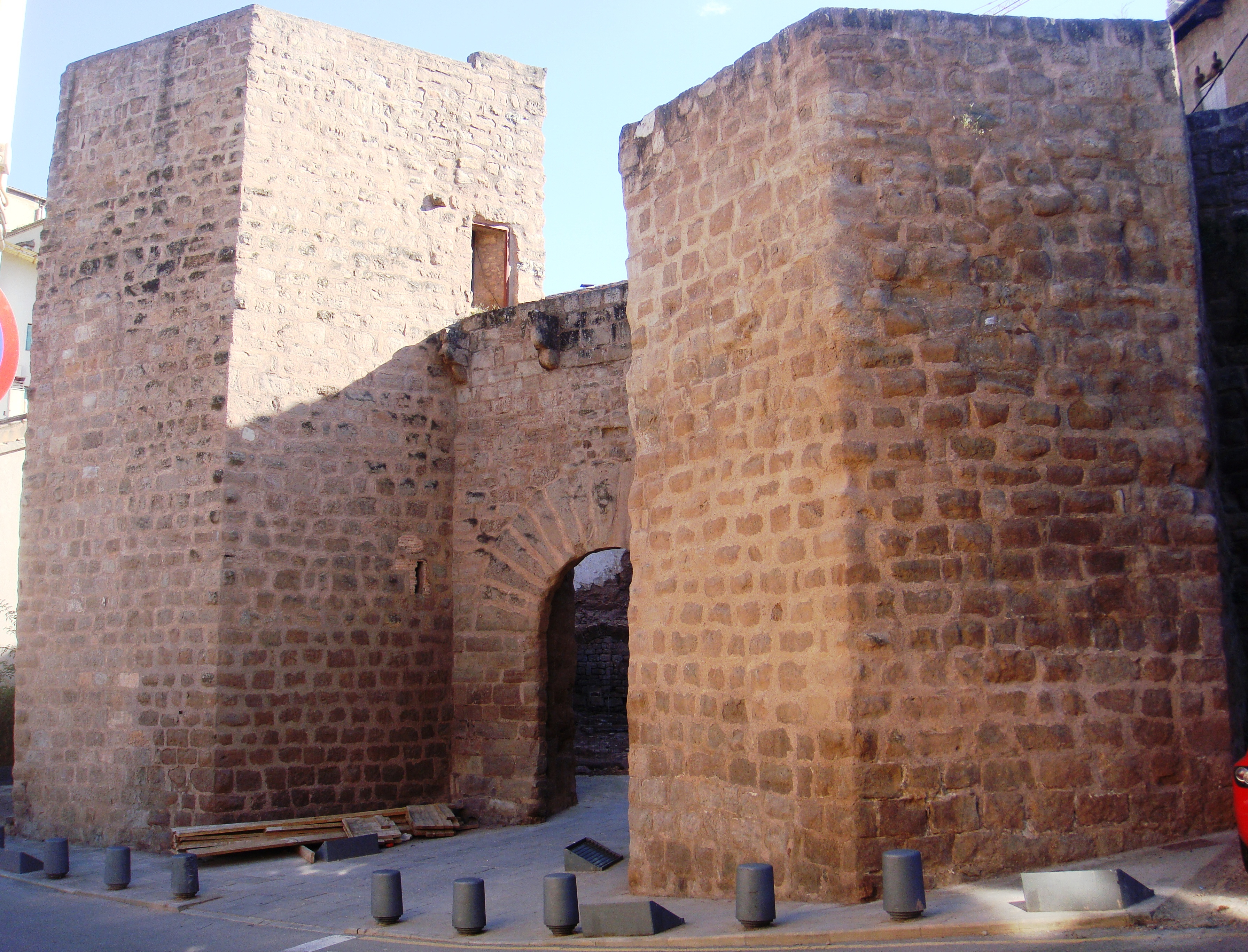 Portal de Graells amb les muralles adjacents.